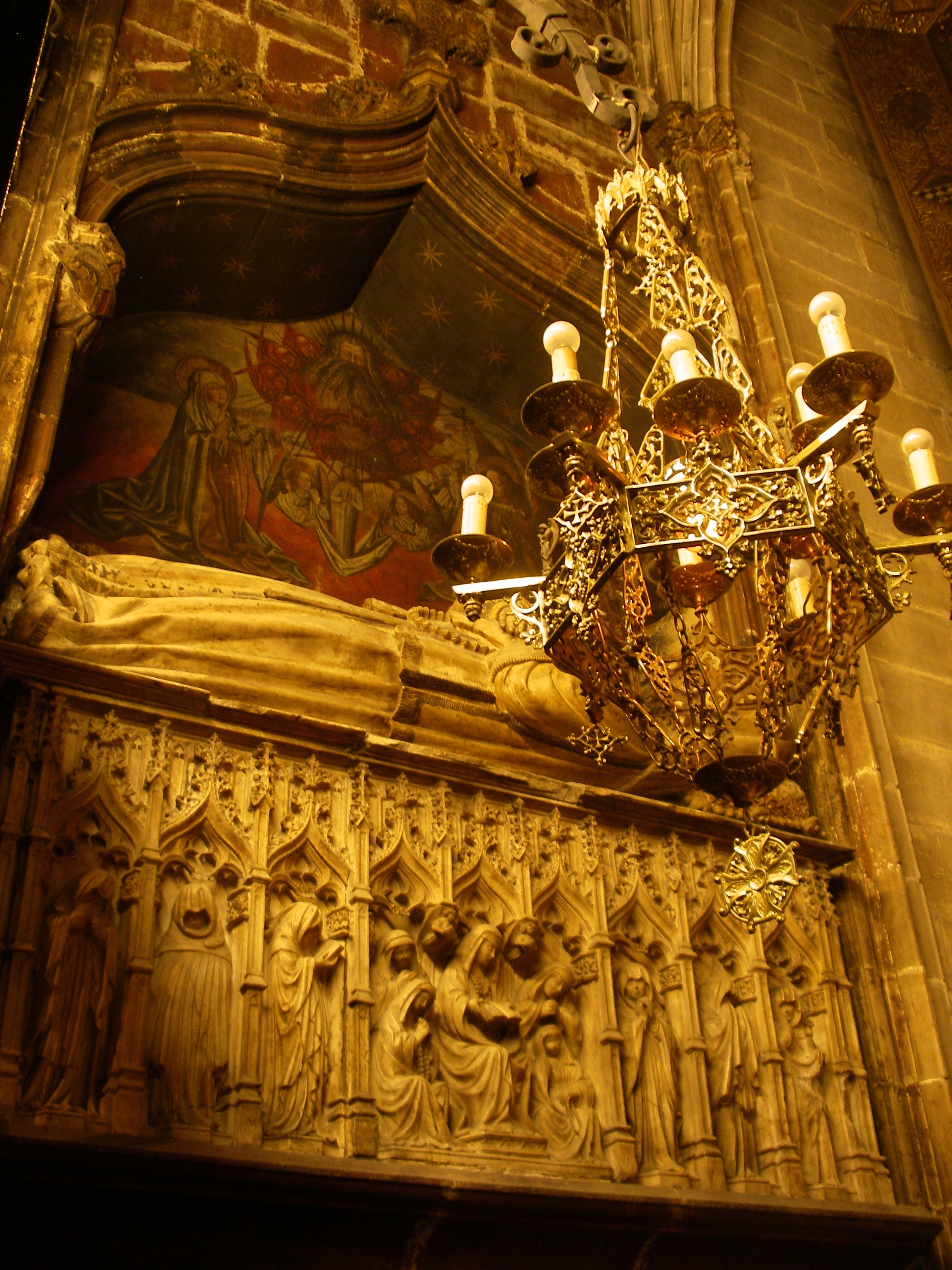 Sepulcre de Sança Ximenis de Cabrera (Catedral de Barcelona), escultura de Pere Oller i pintura de Lluís Dalmau